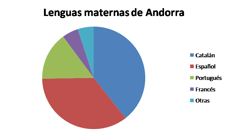 Gráficos de lenguas de Andorra